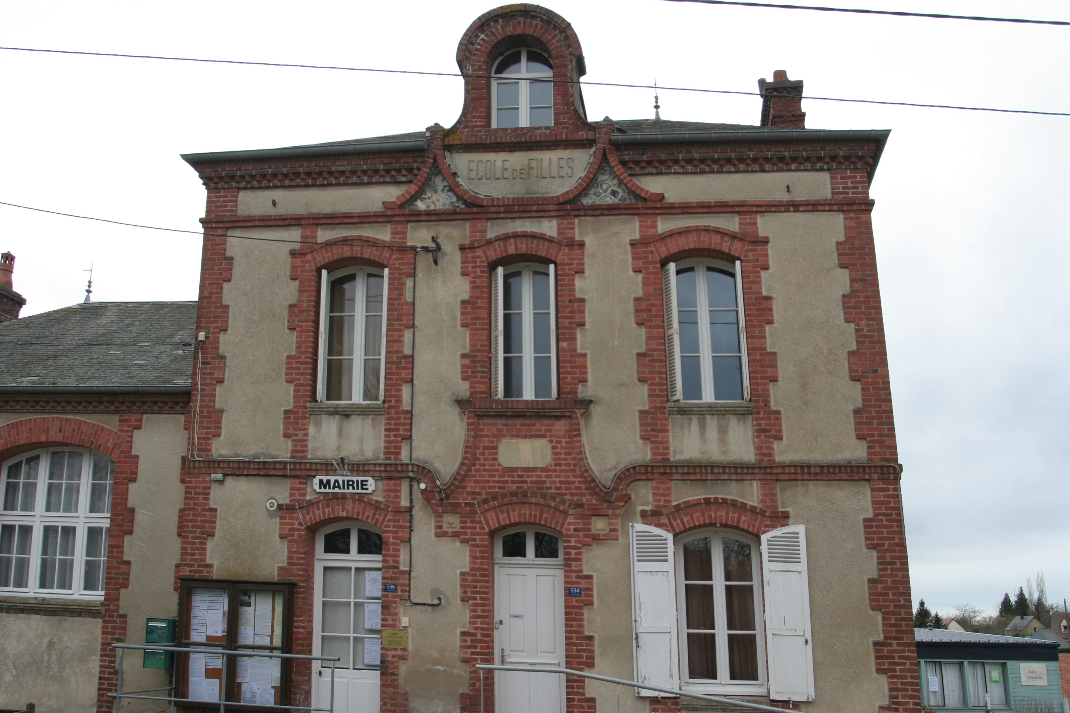 Mairie de Genneville.